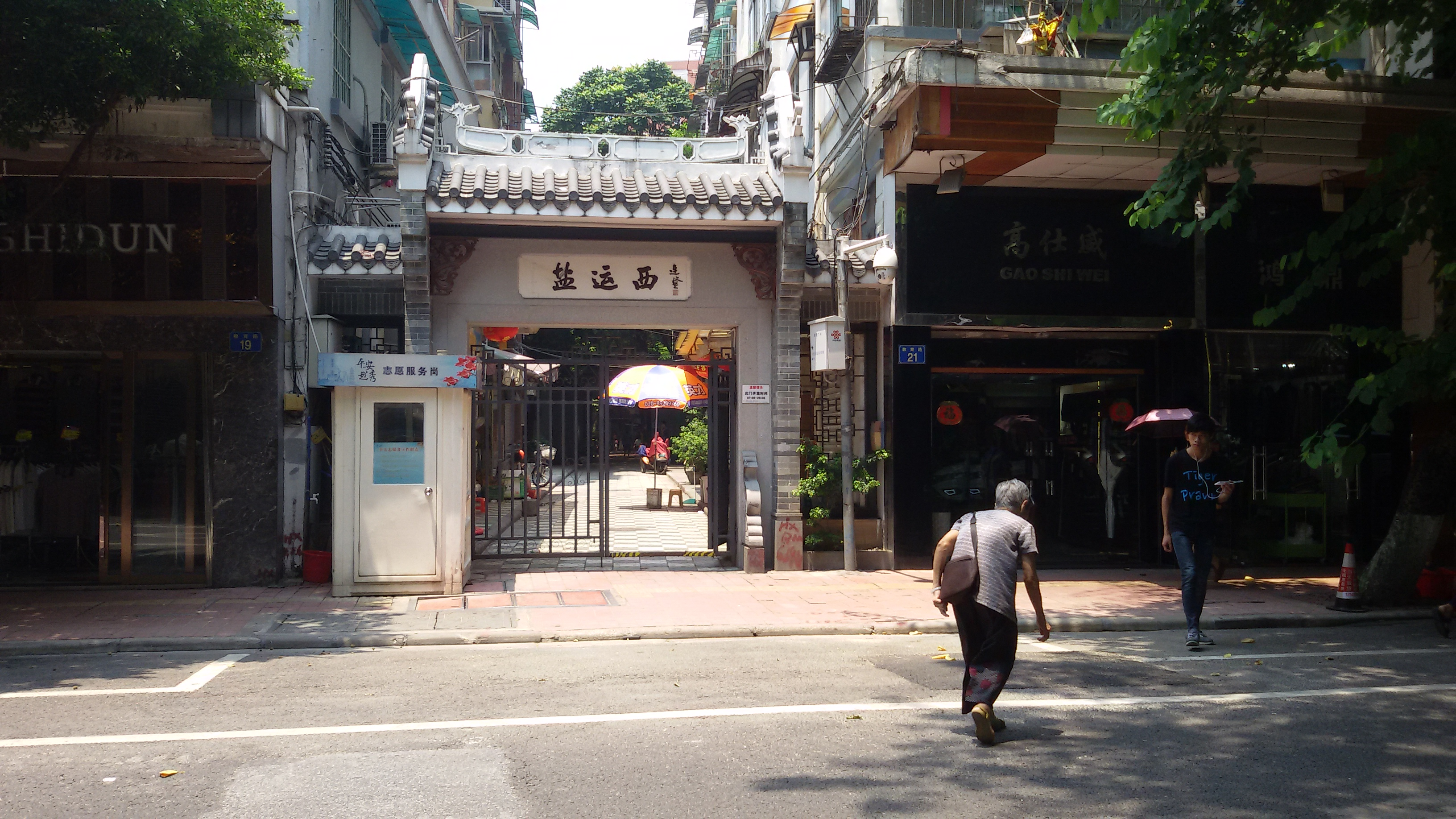 粵語: 鹽運西嘅東牌坊